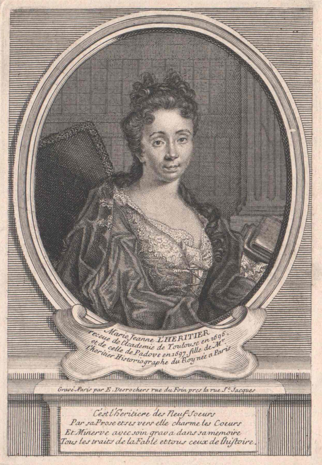 Marie Jeanne de Villandon L'Héritier (1664–1734); Wien, Österreichische Nationalbibliothek, Bildarchiv und Grafiksammlung, Porträtsammlung, Inventar-Nr. PORT_00093510_01